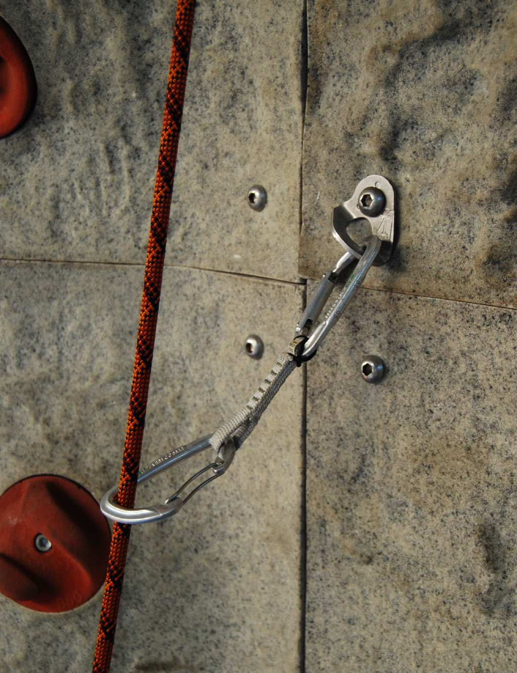 Eine mit einem Expressset eingehängte Zwischensicherung beim Sportklettern. Die Karabiner sind falsch in die Expressschlinge eingehängt.